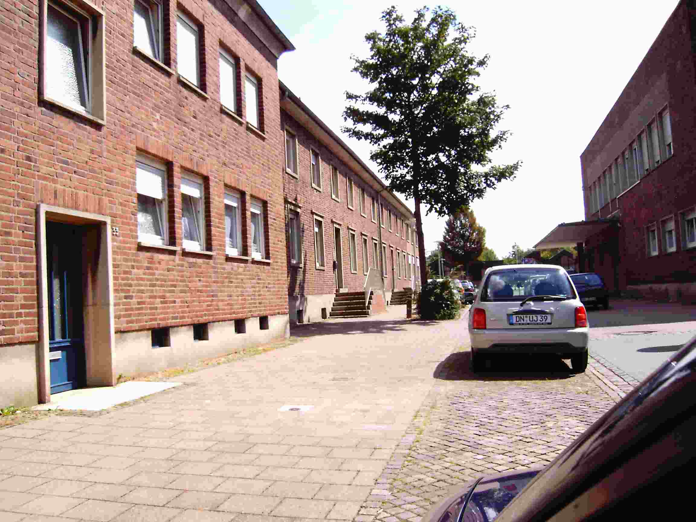 Grüngürtel (Düren) 2 own work papa1234 2006-08-13